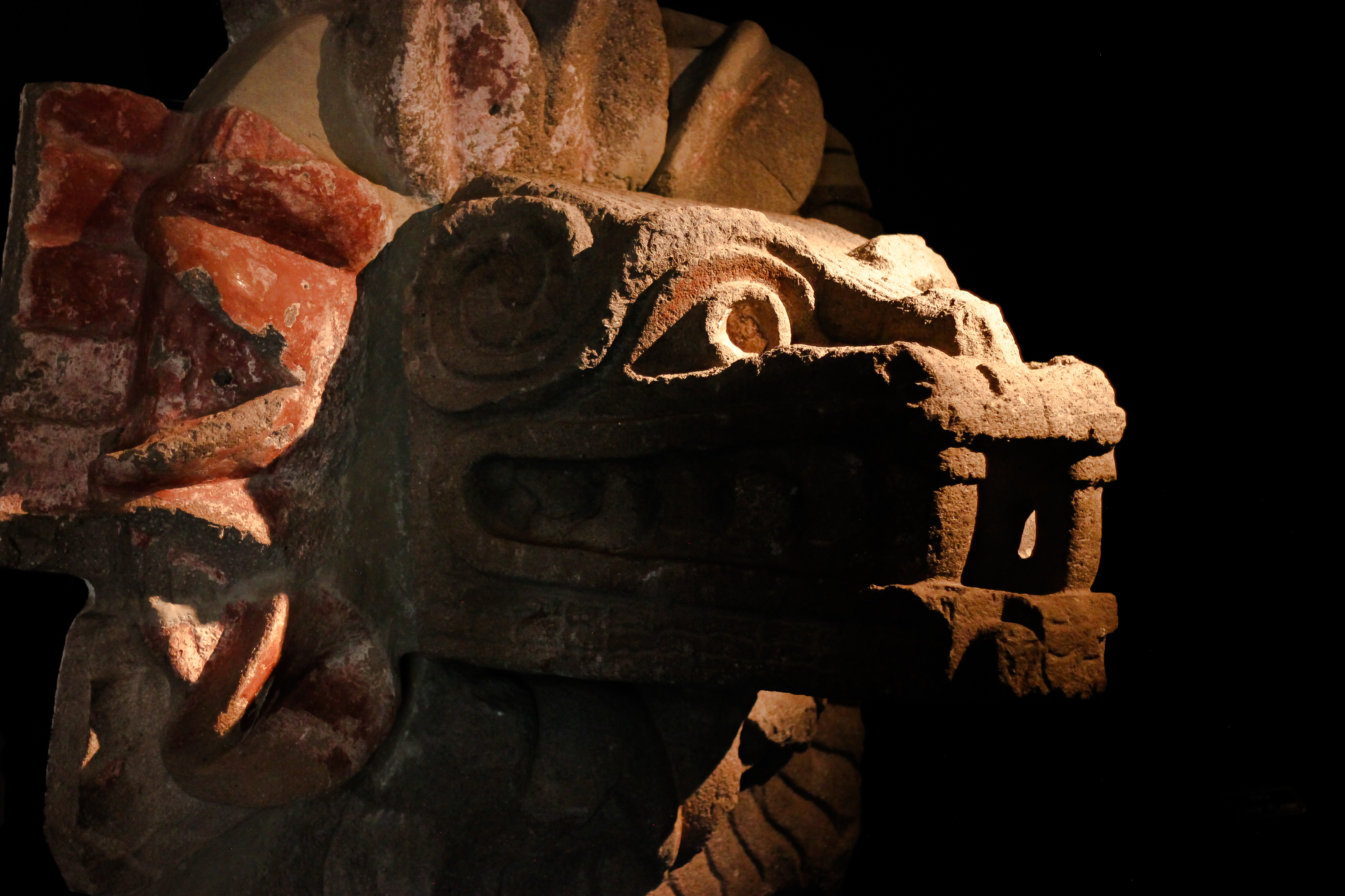 Cabeza gigante en representación de Quetzalcoatl en el museo de antropología en Teotihuacan